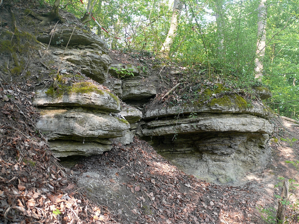 Untere Sulfatschichten, Heilbronn-Formation, Mittlerer Muschelkalk, Löwenburg bei Braunsbach-Geislingen